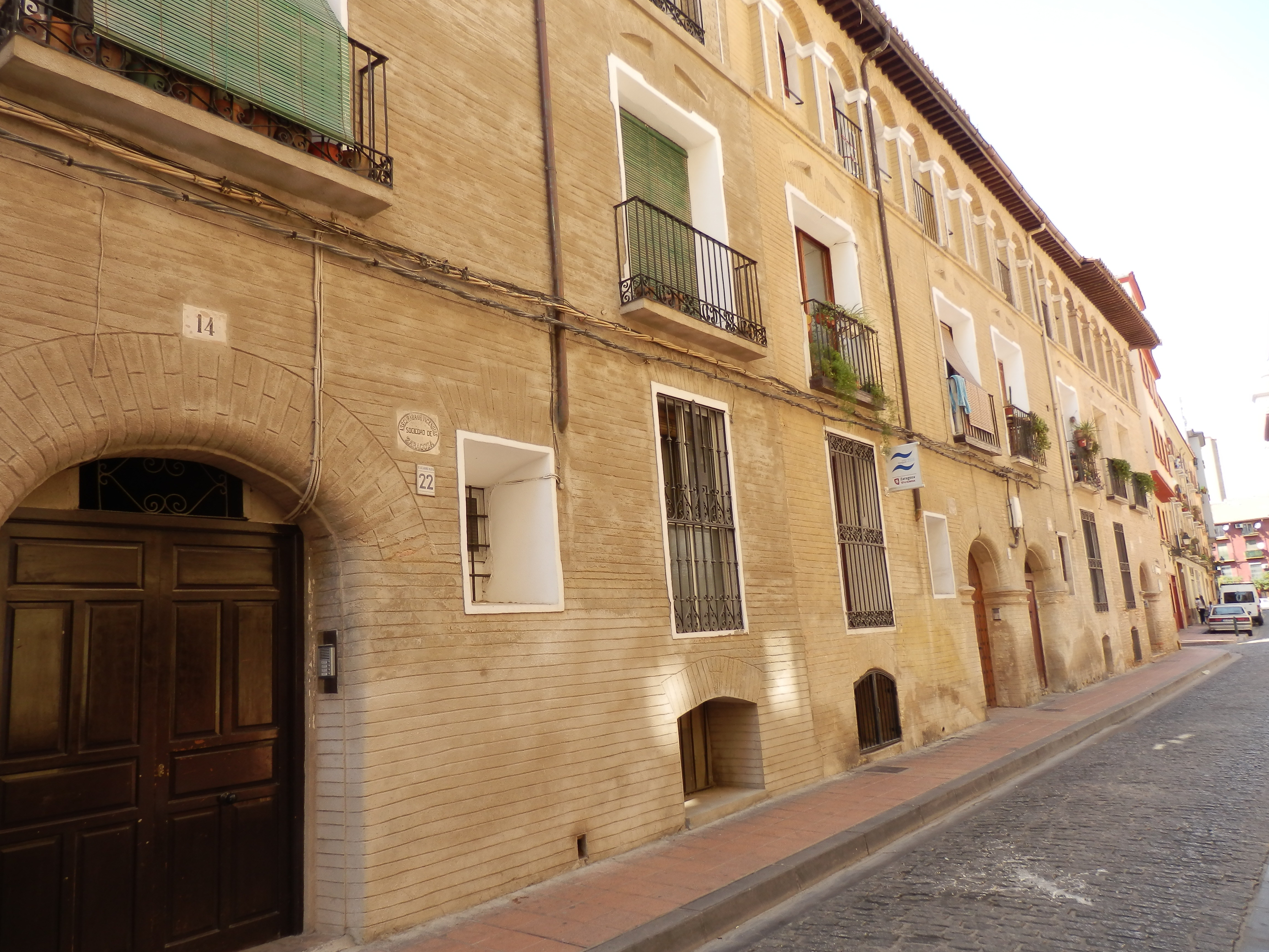 Edificio de viviendas situado en la calle Doctor Palomar, 16, 18, 22, de Zaragoza, España. Es bien de interés cultural (BIC) de la provincia de Zaragoza.